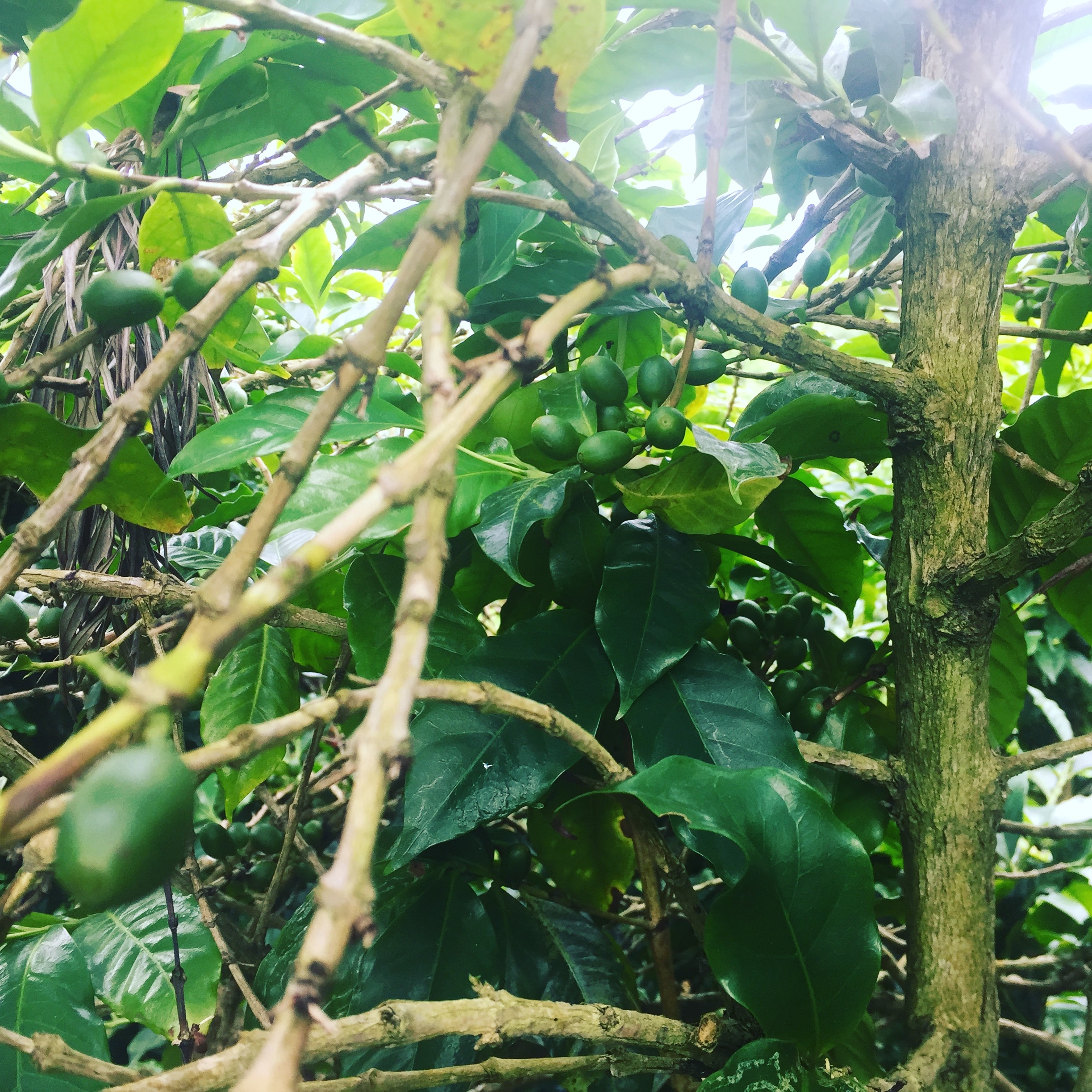 Gros plan du caféier Coffea arabica var. laurina